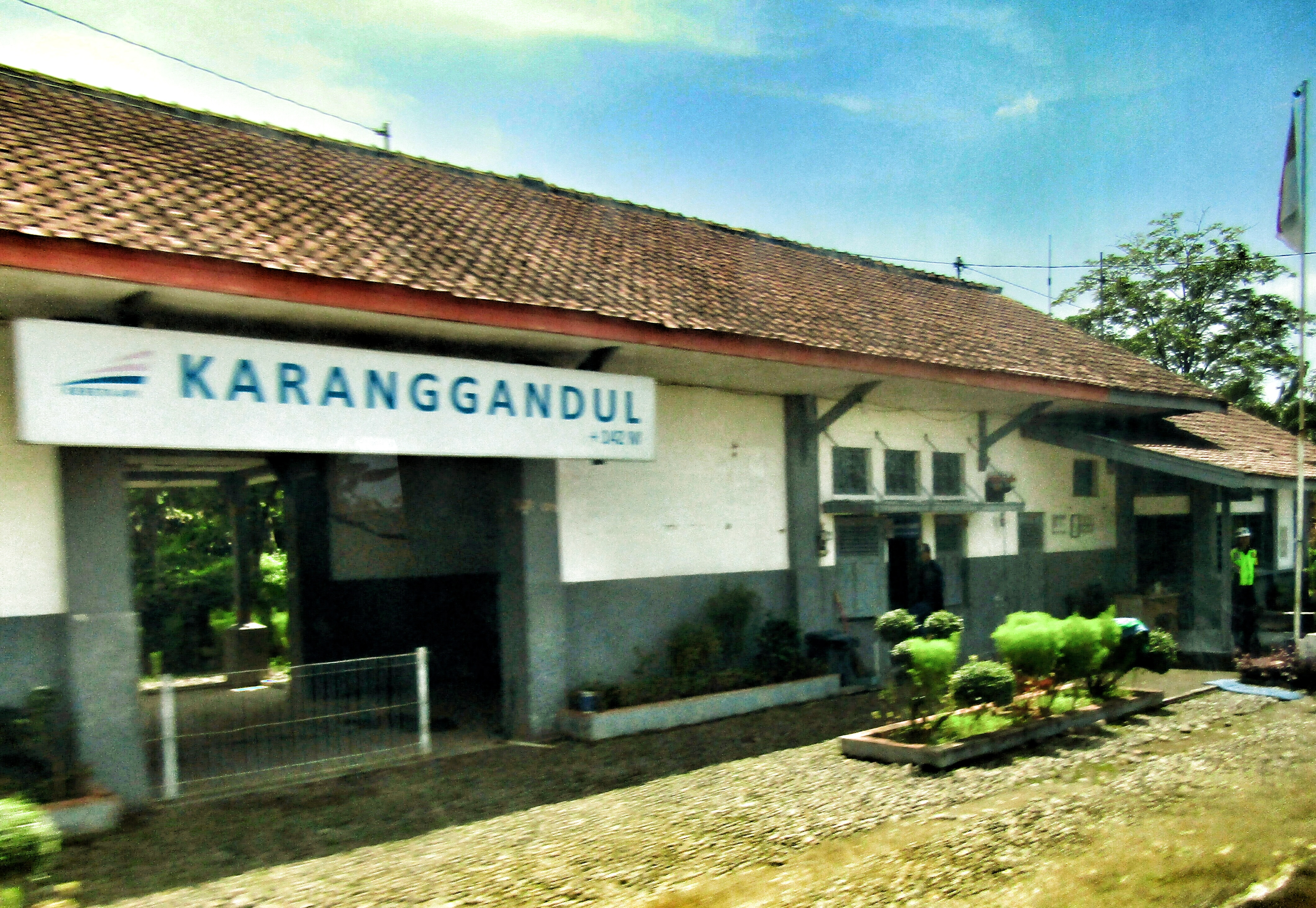 Tampak peron Stasiun Karanggandul, 2019